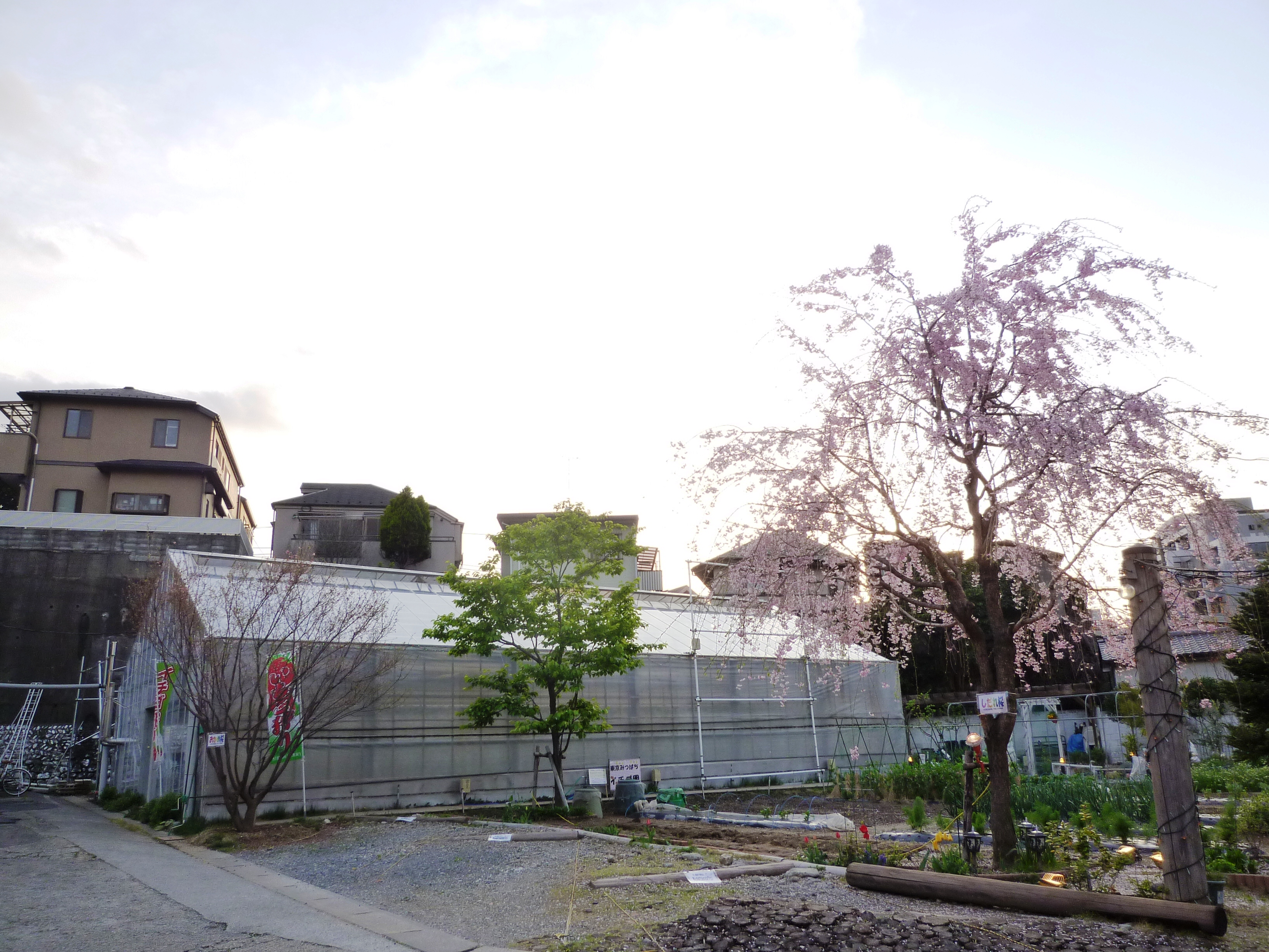 西台のイチゴ農園